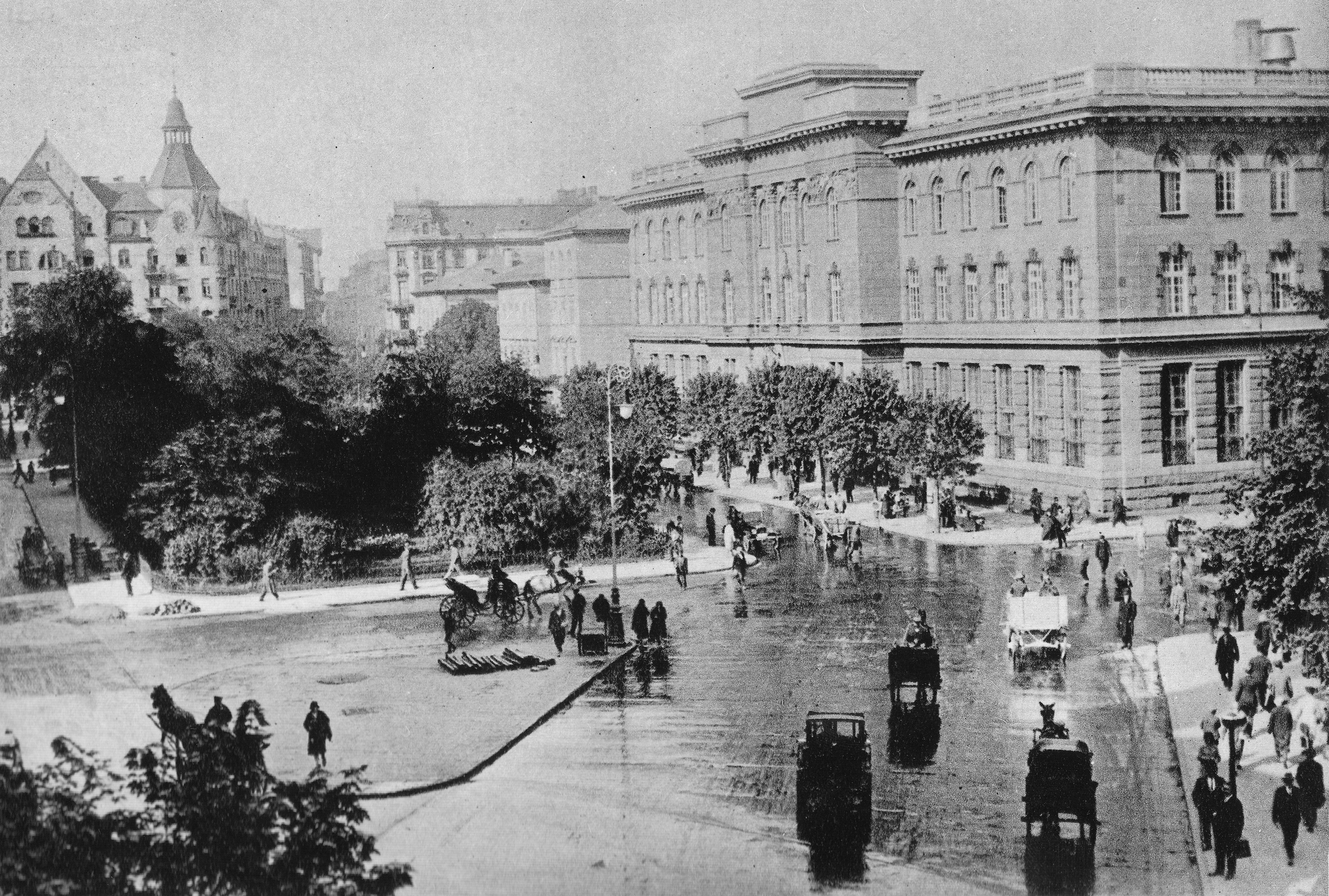 Plac Napoleona (obecnie Powstańców Warszawy) w Warszawie